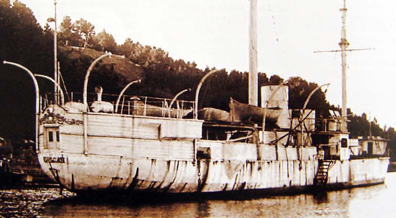 Foto del monitor Huáscar en la década de 1920, cuando se mantenía a flote gracias a pequeñas reparaciones